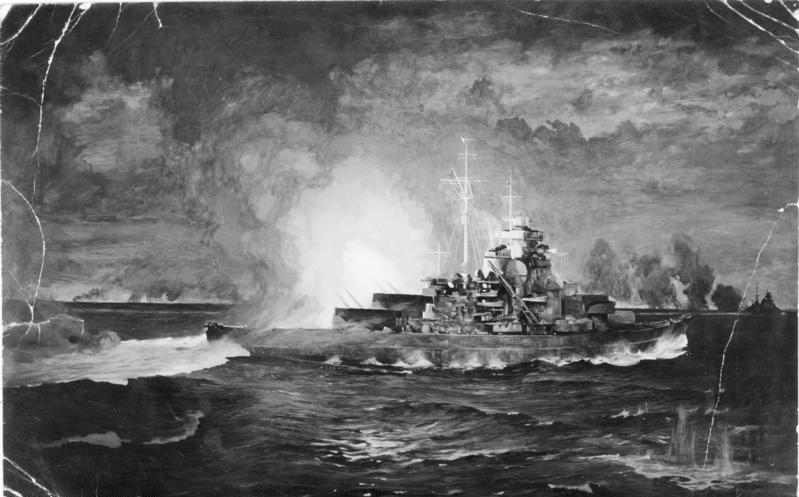 Der Kriegsmaler Dr. J.C. Schmitz-Westerholt, der das Gefecht bei Island auf Prinz Eugen mitmachte, malte für das OKM dieses Tempera-Gemälde: Bismarck schießt eine Breitseite auf die Hood.